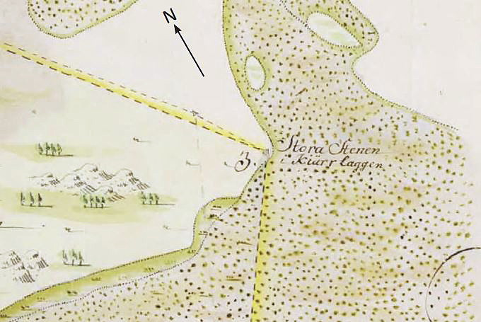 På kartan från 1729 kallas stenen Stora Stenen i Kiärr Laggen.